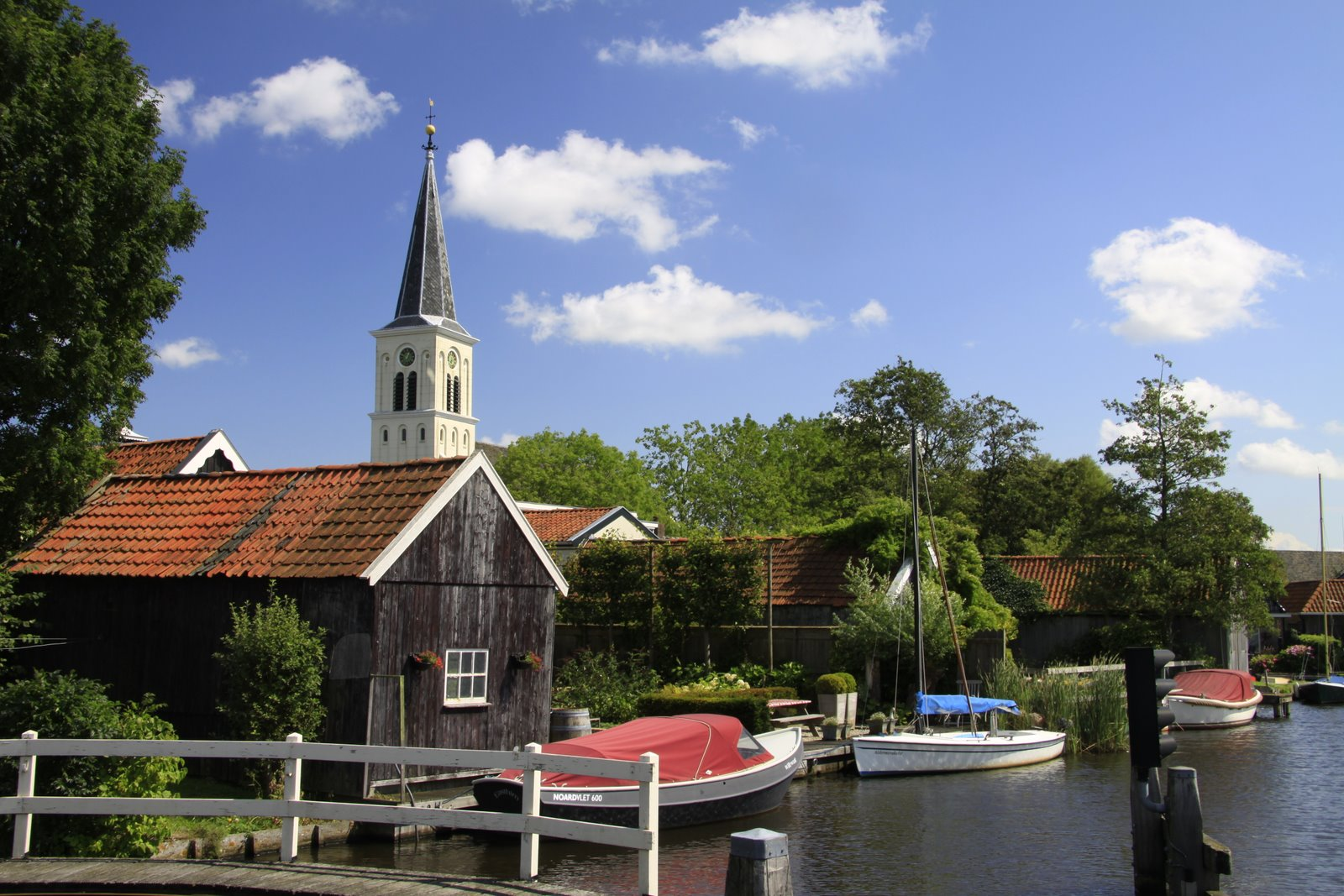 Oosthem in de Gemeente Sûd West Fryslân.